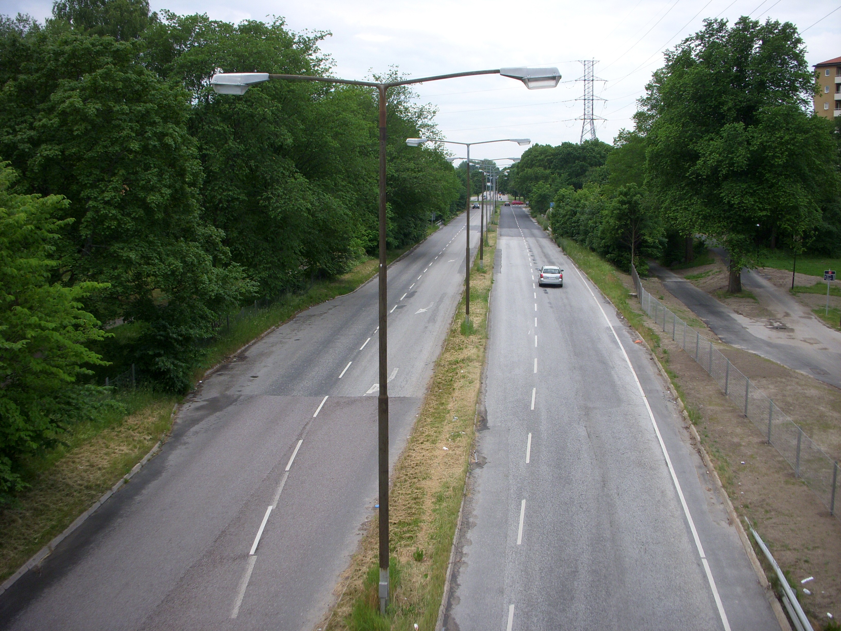 Johanneshovsvägen, Stockholm. Vy söderut från bron på Gullmarsvägen.